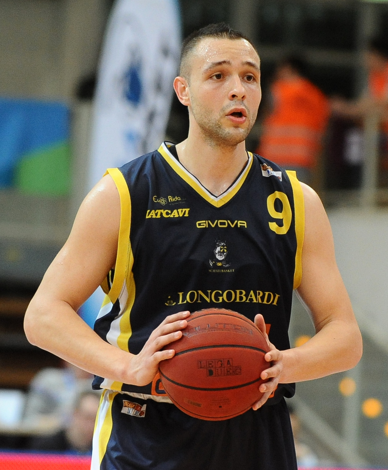 Jonathan Tavernari con la maglia dello Scafati Basket al PalaTrento.